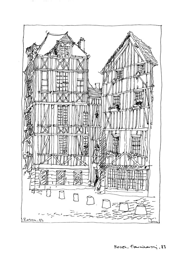 Rouen, Franciaország (útirajz)